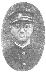 土井英一 死の前年に写されたもの。